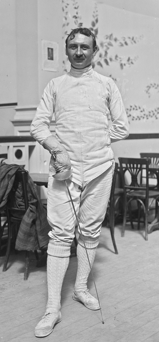 Cornereau, Français [escrimeur, Luna Park, championnat d'Europe d'escrime, 16-17 juin 1922] : [photographie de presse] / [Agence Rol]